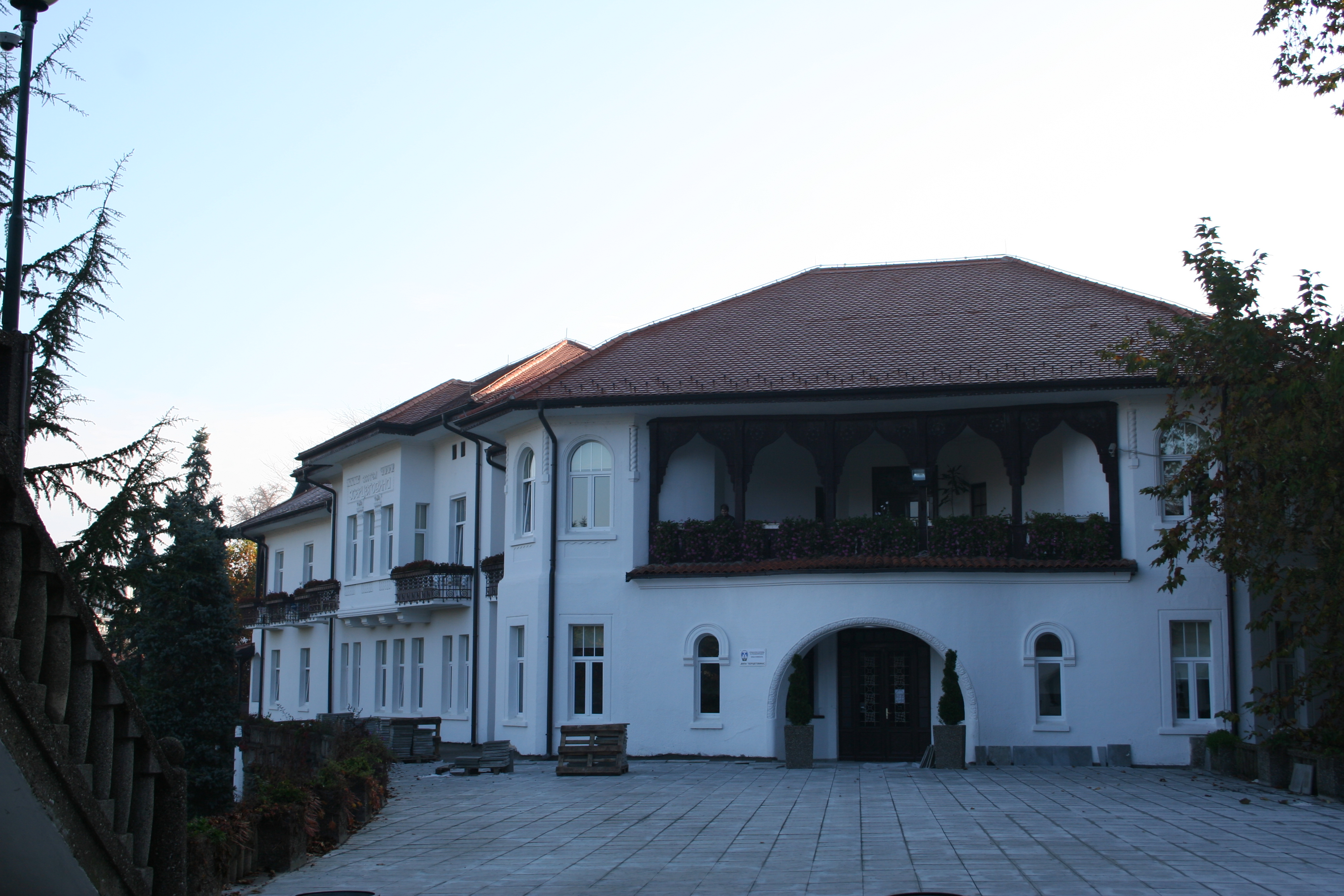 Specijalna bolnica za rehabilitaciju Banja Koviljača